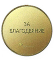 Знак отличия «За благодеяние» (Российская Федерация) Оборотная сторона